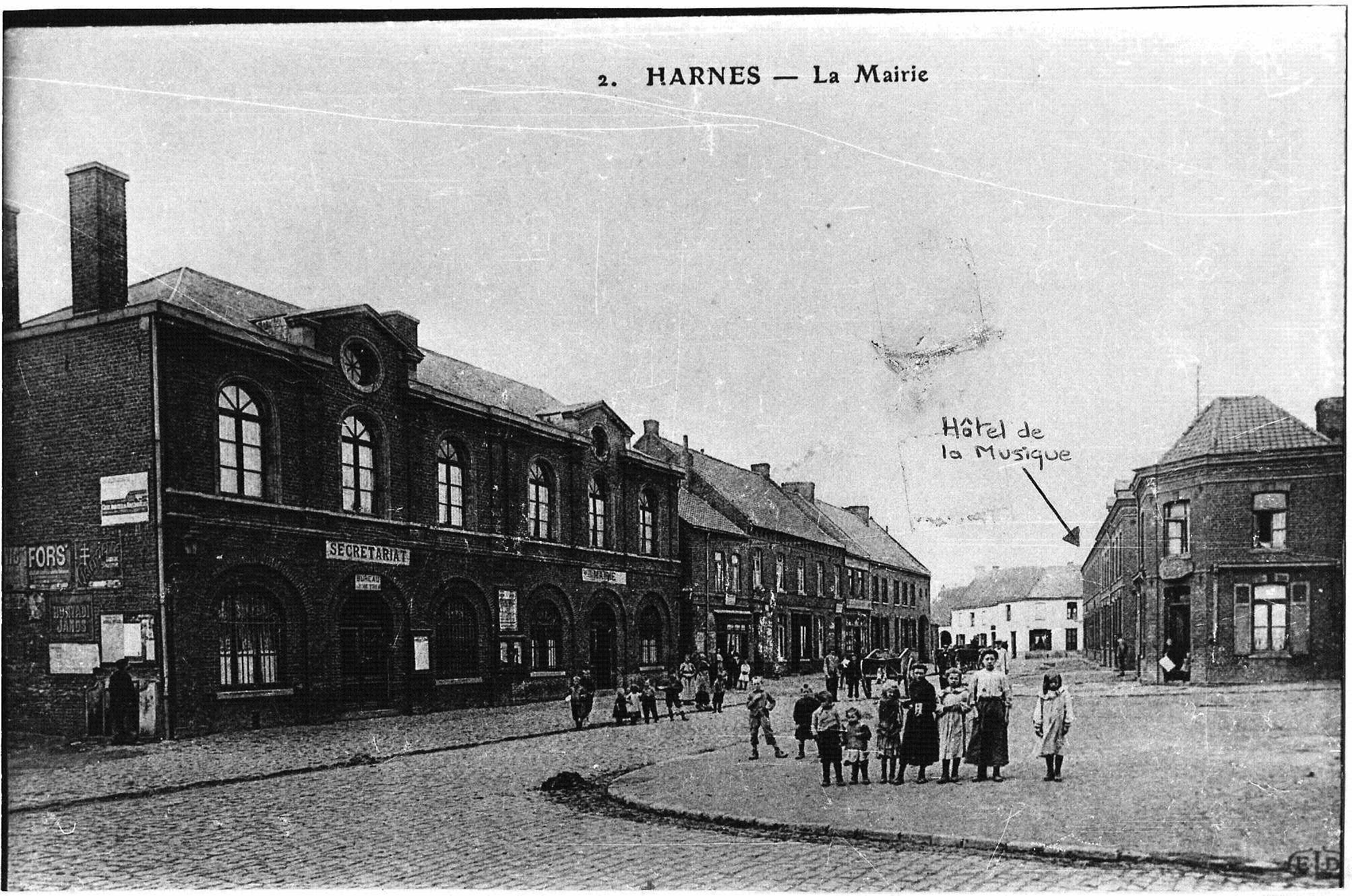 Hôtel de la Musique financé par un mécène pour la fanfare " La Jeune France " de Harnes